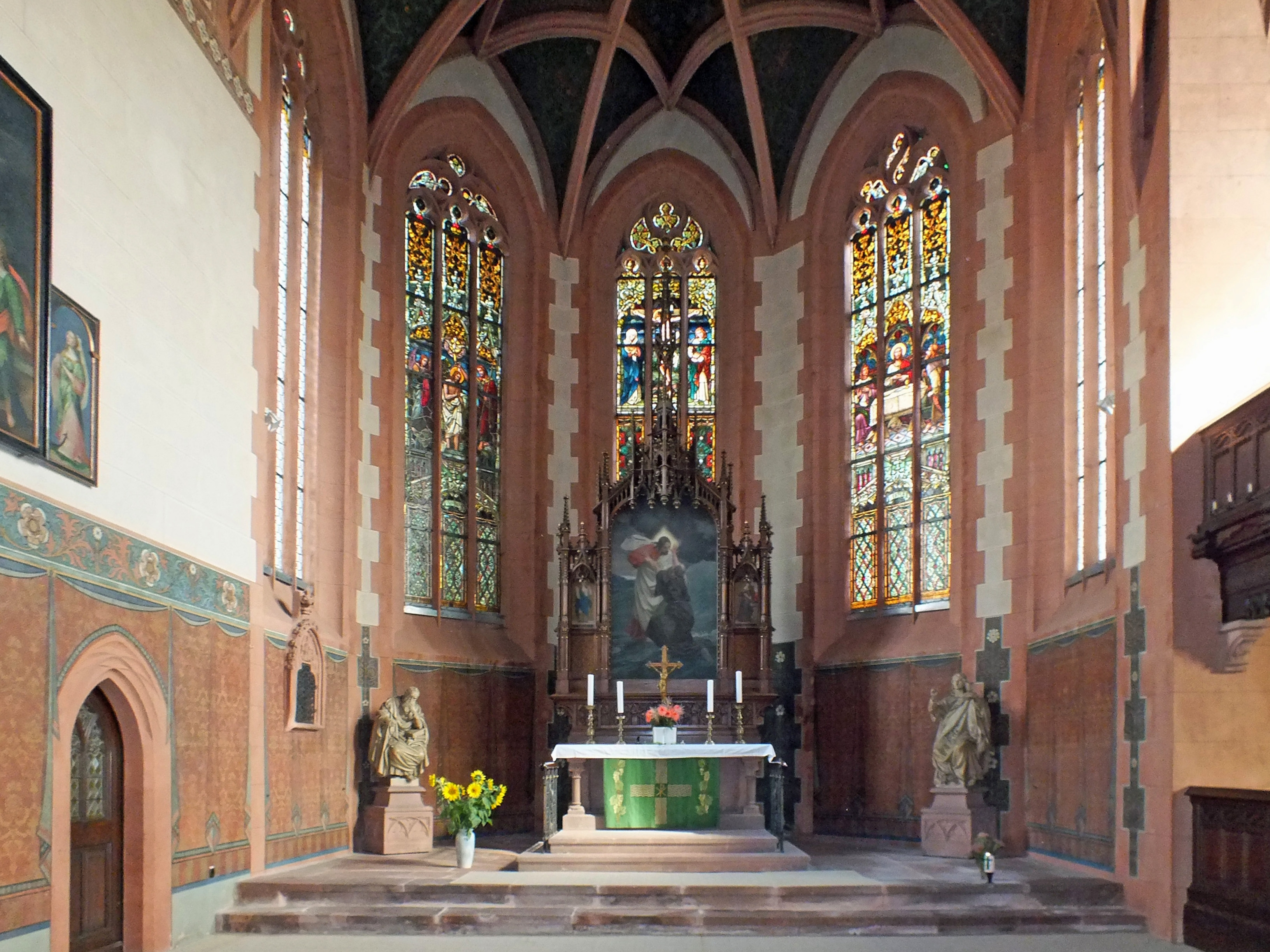 Chorraum der St. Petri-Kirche in Rochlitz mit dem Altargemälde von Alexander Stichart